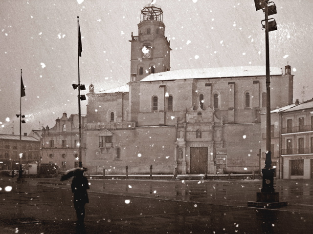 Colegiata de Medina del Campo durante una atípica nevada.Colegiata de San Antolín, obra de Juan Gil de Hontañon del siglo XVI.